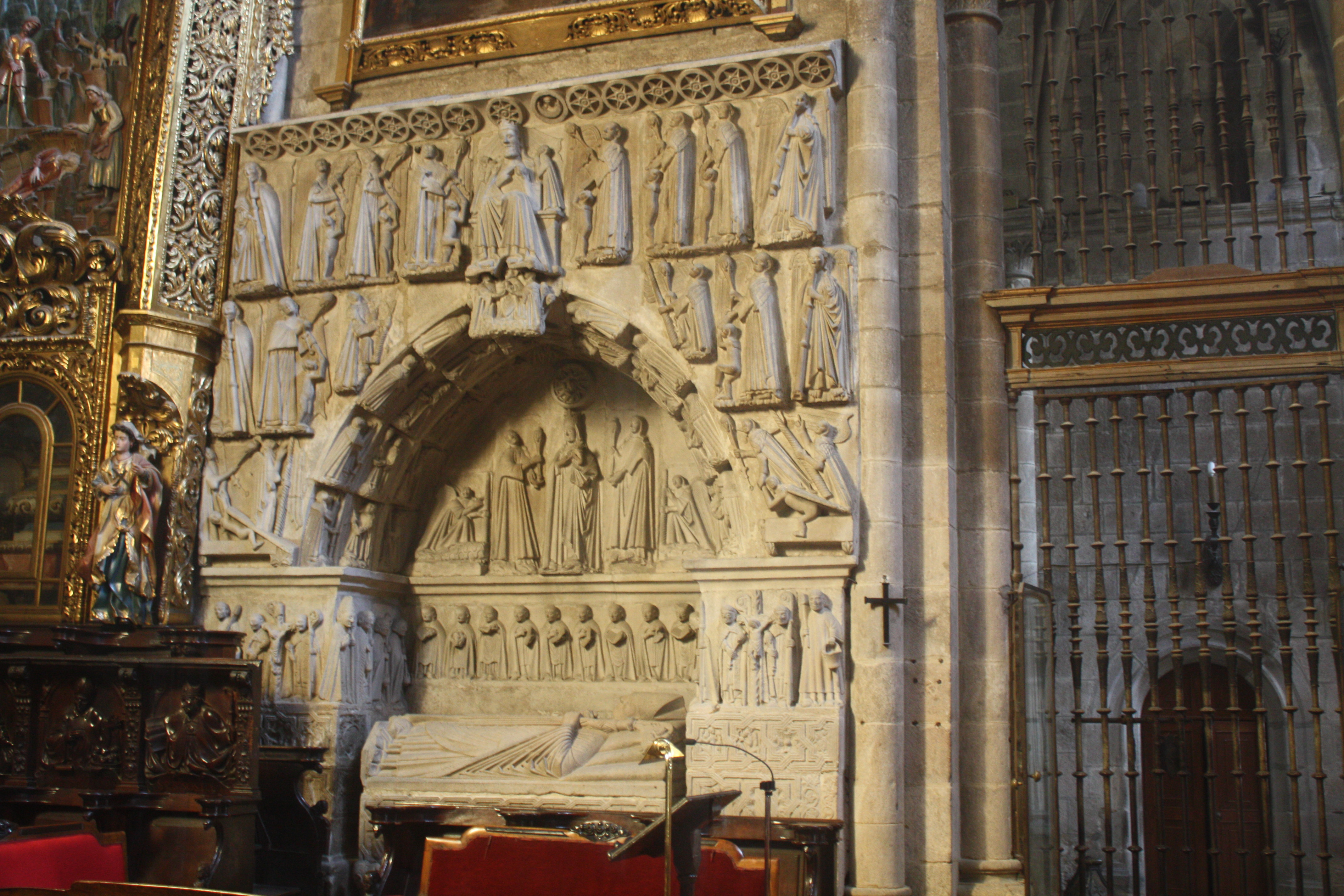 Sepulcro do Bispo descoñecido, a capela maior da Catedral de Ourense.